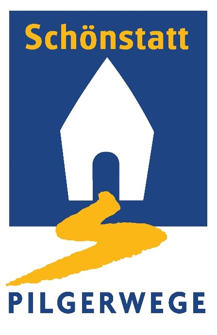 Schönstatt Pilgerwege als Hinweisschild